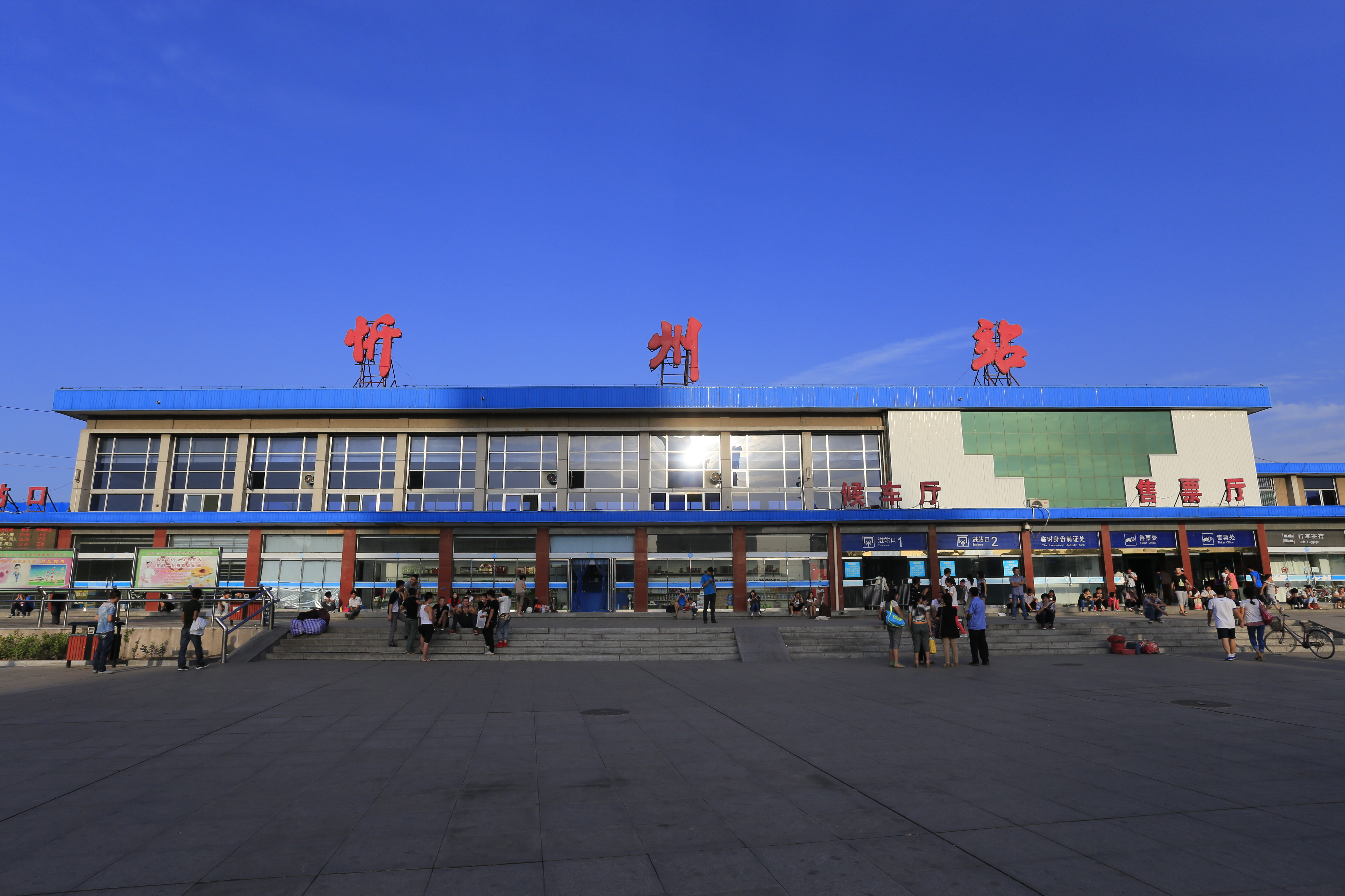 忻州站